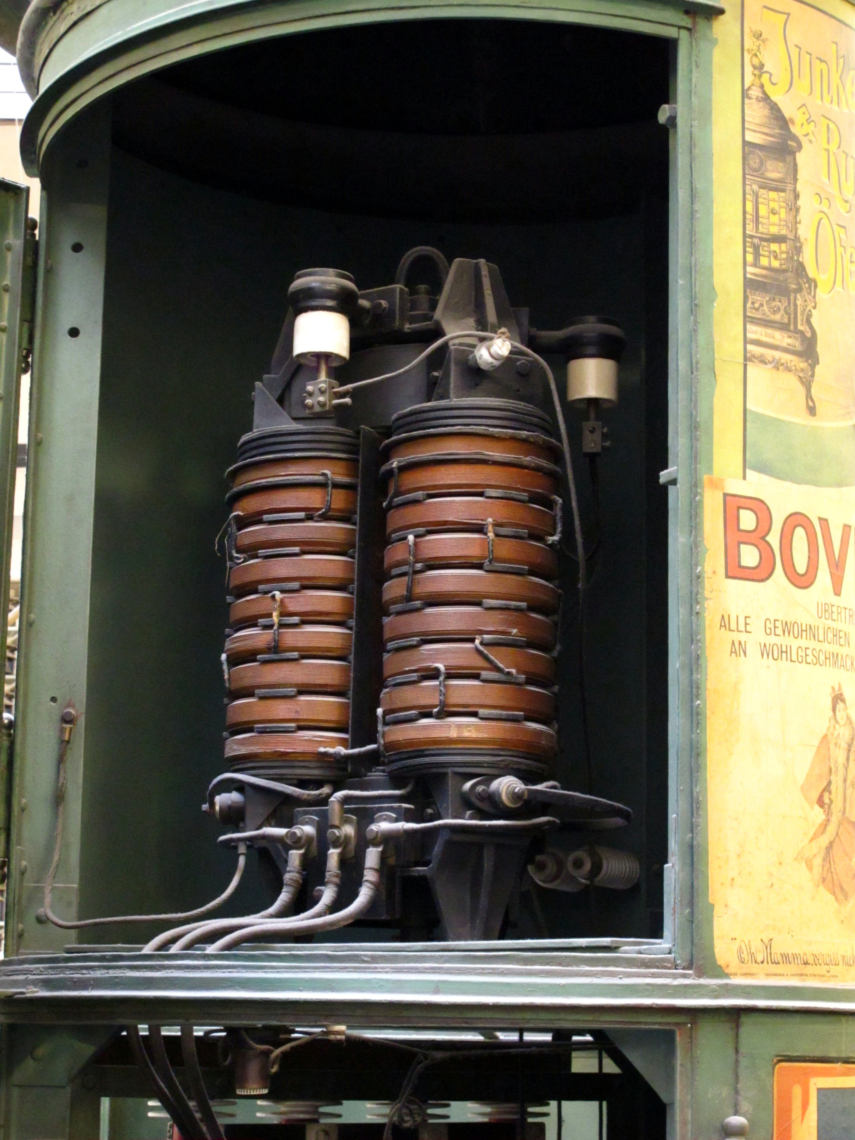 Transformator einer frühen Transformatorenstation in einer Anschlagsäule, welche um 1900 in Augsburg stand. Der Dreiphasentransformator hat eine Leistung von 10 kVA und setzte die Mittelspannung von 5000 V auf die Niederspannung von 125 V für den Anschluss von Glühlampen herab.